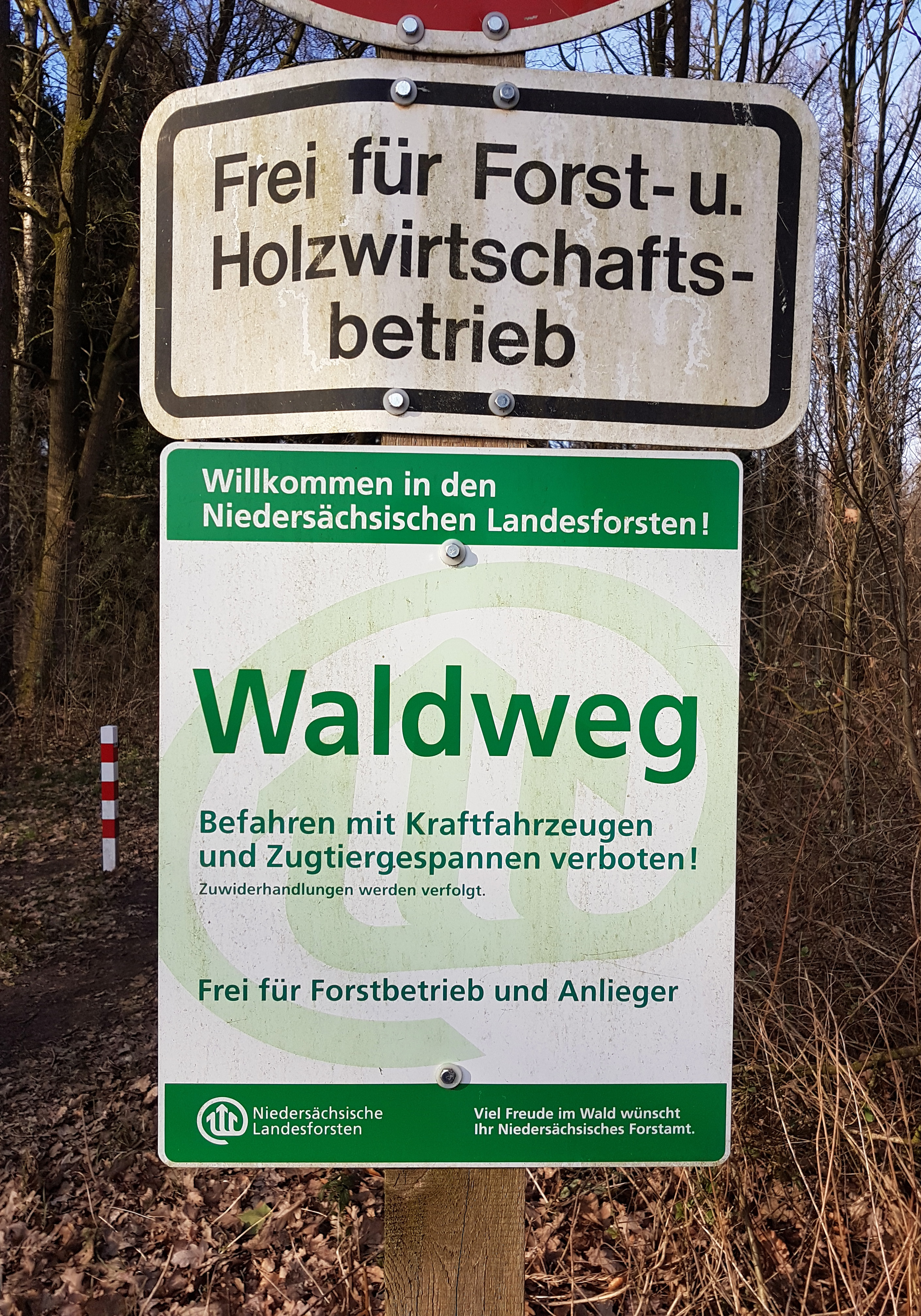 Schild Waldweg